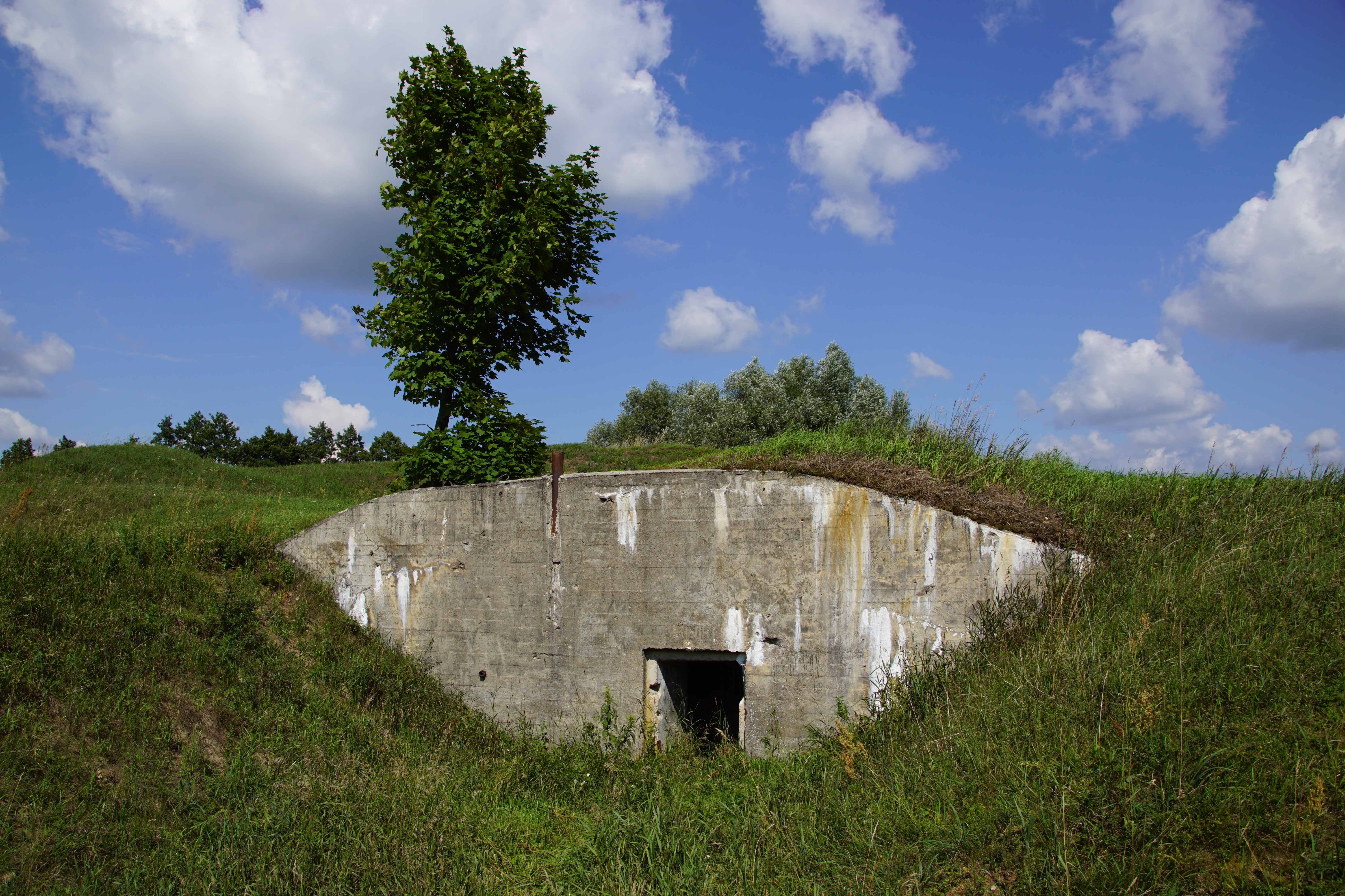 Schron bierny dla 1 drużyny piechoty, kategoria odporności C, D, Niemiecka nazwa typu Gruppenunterstand, Załoga 10 żołnierzy